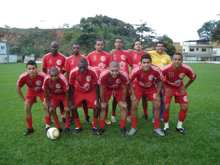 Time do Brasil Industrial Esporte Clube, de Paracambi.